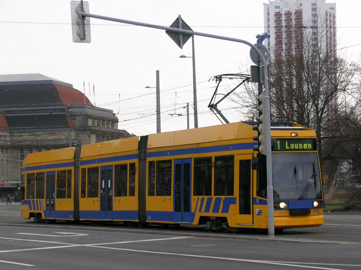 NGT8D in Leipzig auf dem Willy-Brandt-Platz.